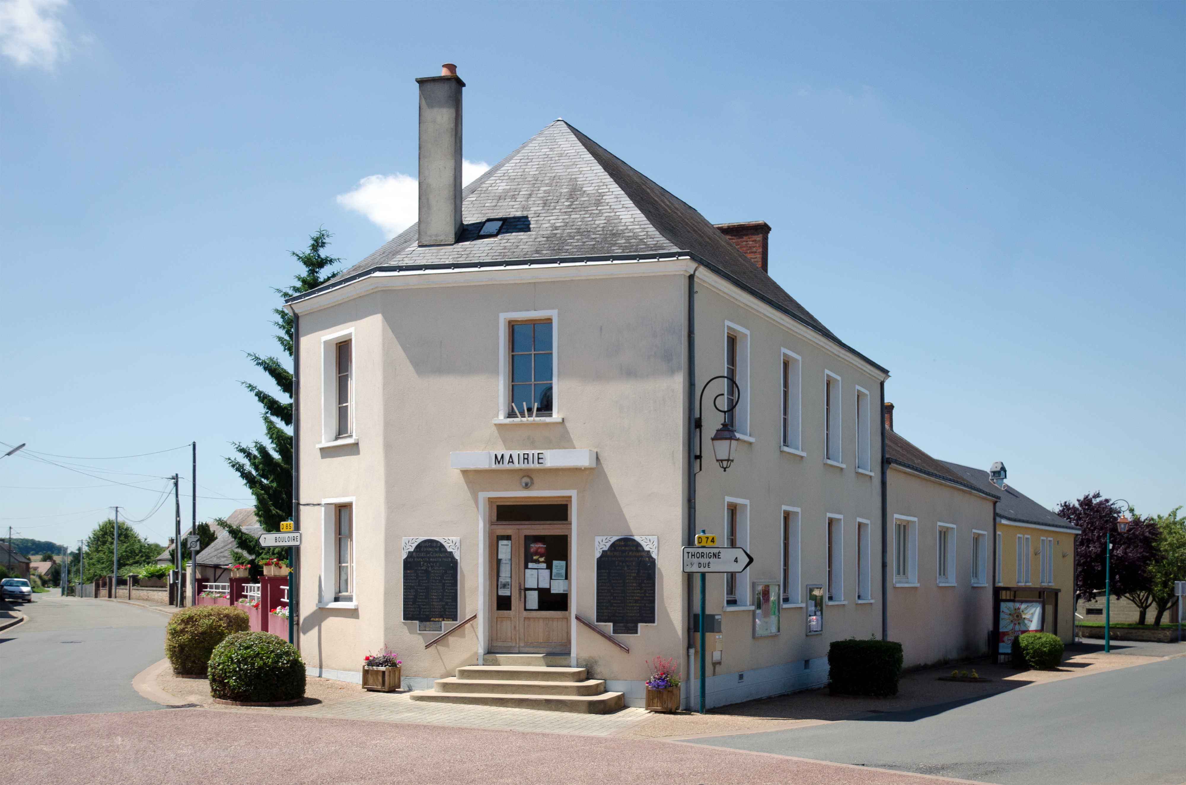 Mairie de Saint-Michel-de-Chavaignes, Sarthe.